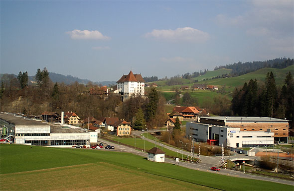 Sumiswald